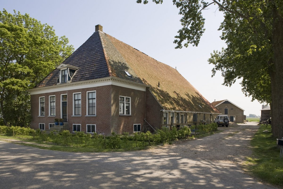 Rijksstrjitwei 15, Menaldum